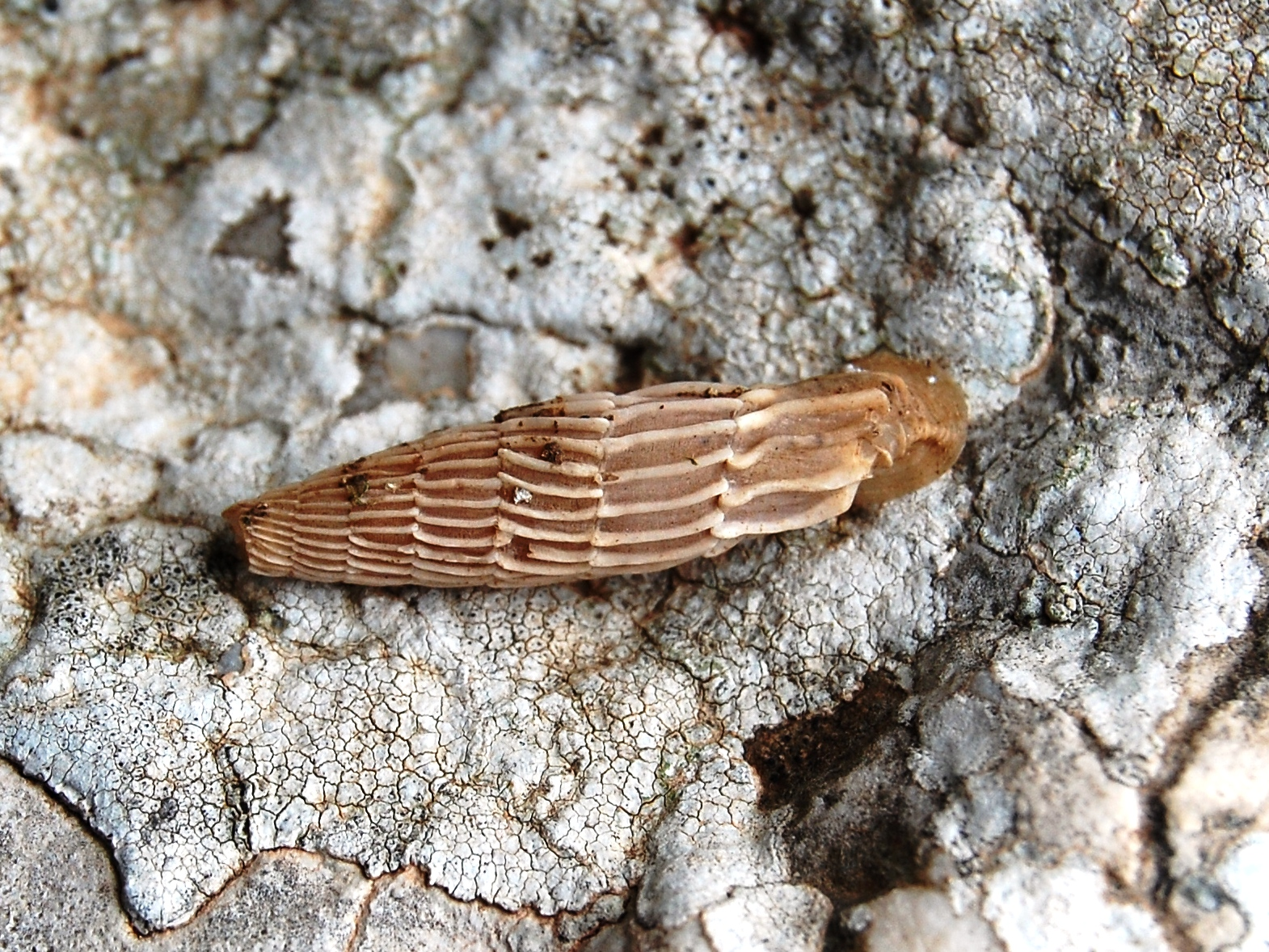 Siciliaria crassicostata - Riserva naturale Monte Cofano, Sicily